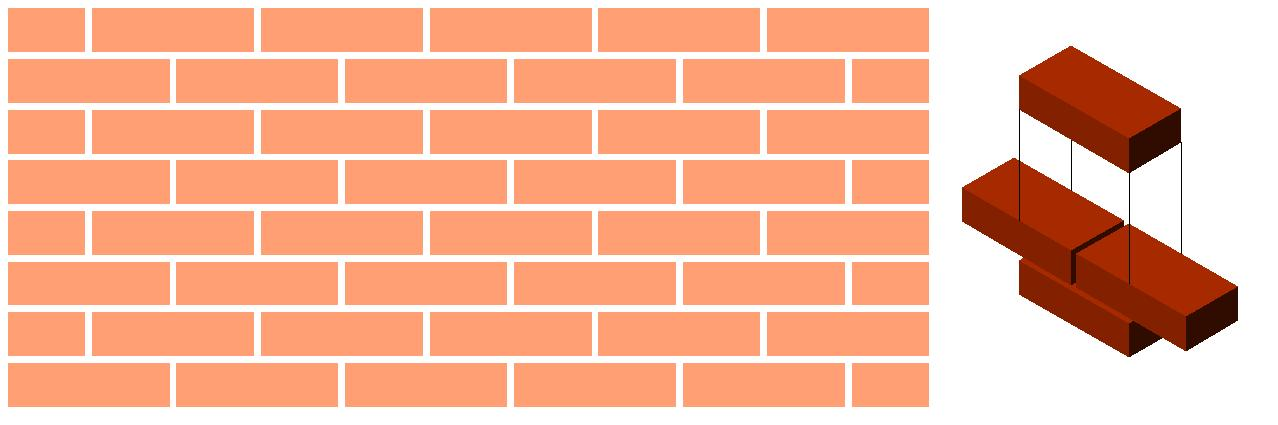 Aparejo a sogas